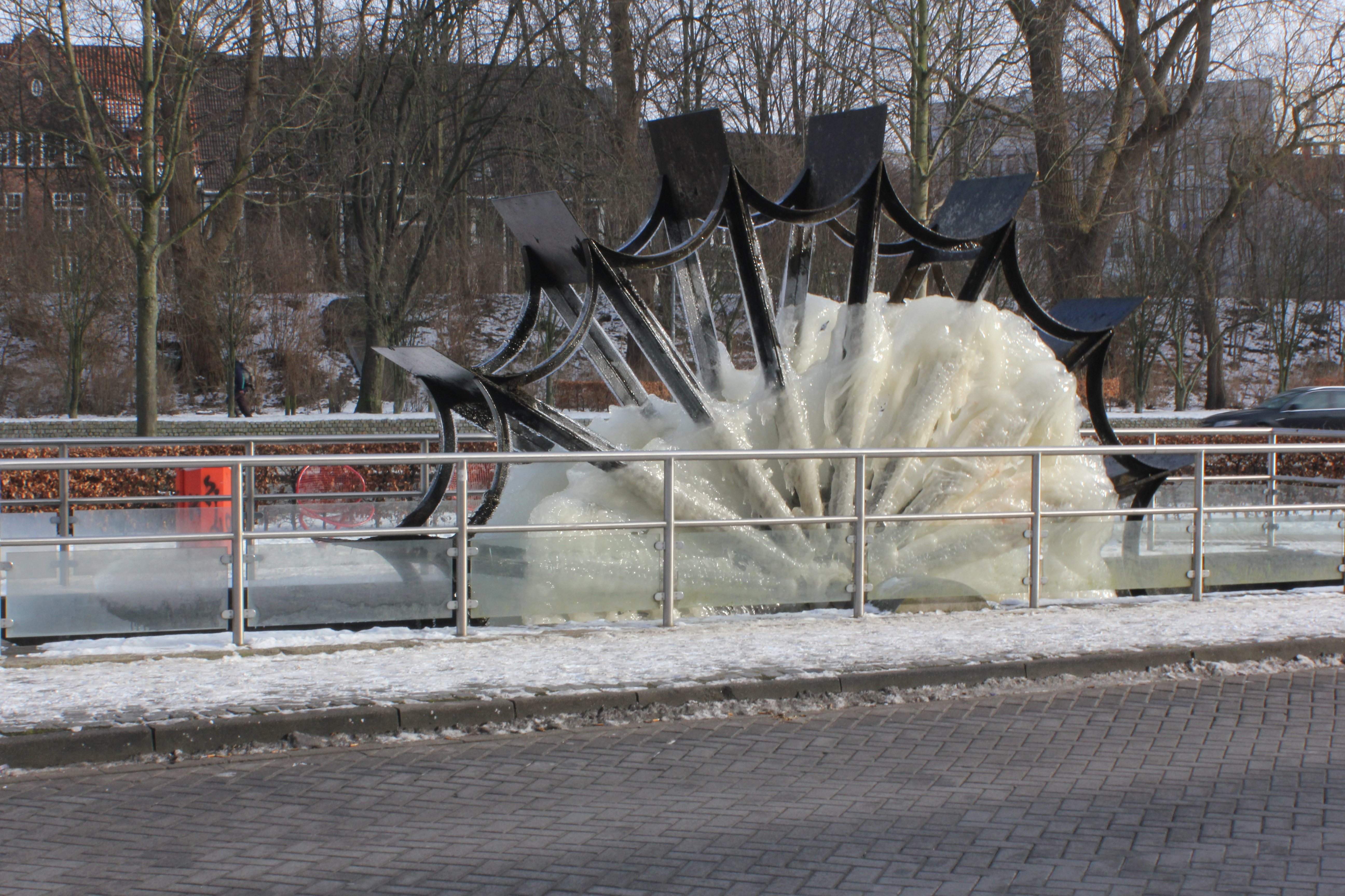 Mühlenstrom-Wasserrad beim ZOB, Flensburg, Bild 7